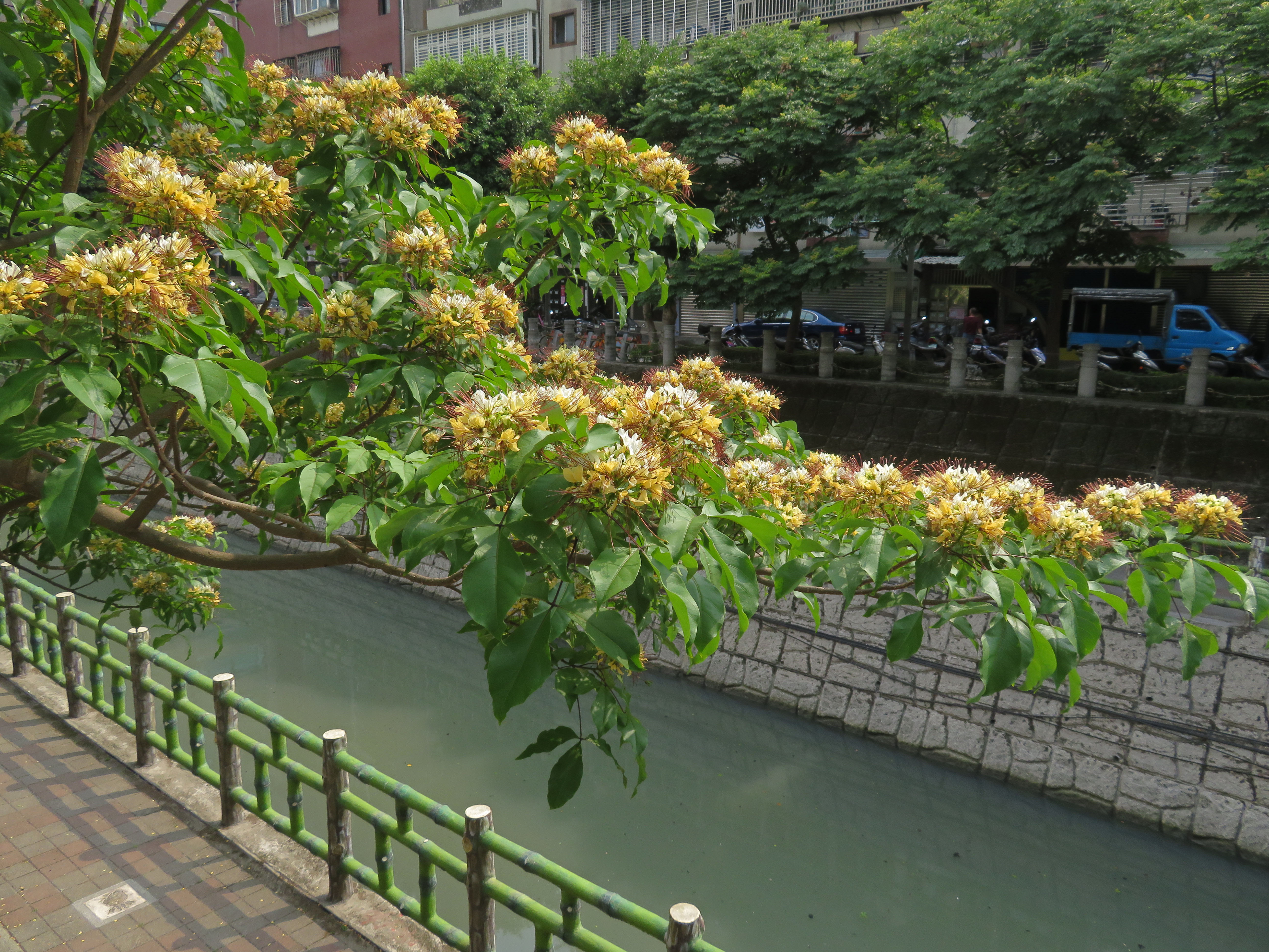 中文（台灣）: 每年五月廟仔尾溝畔台灣魚木盛開